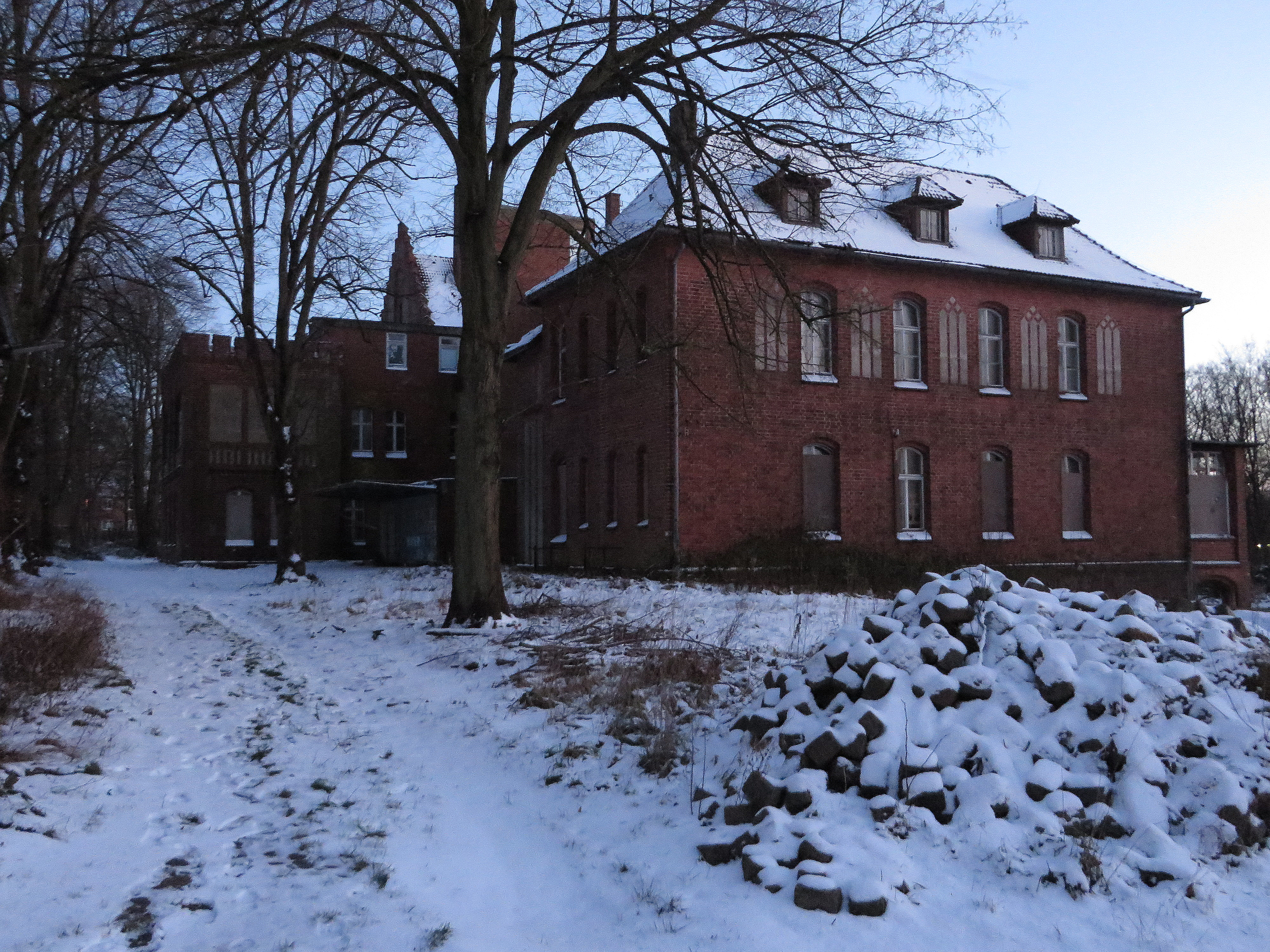 Hauptgebäude, Marinelazarett Mürwik mit Klinik-Ost-Eingang (Januar 2015)